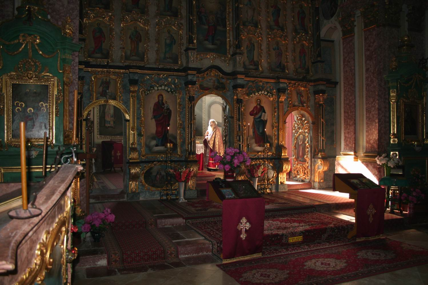 Autor: Negovan Laušev. Jeromonah Pantelejmon služi liturgiju u manastiru Grabovcu u Mađarskoj.